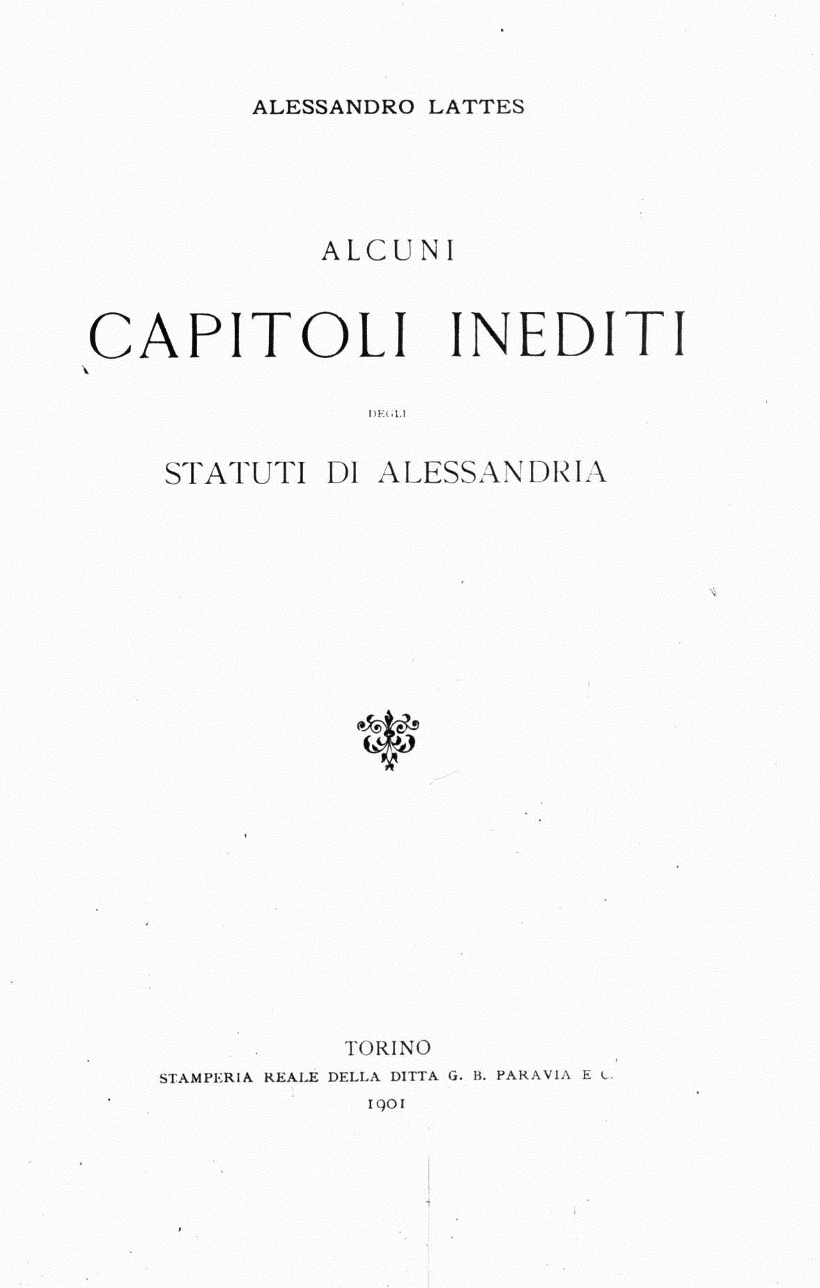 Frontespizio